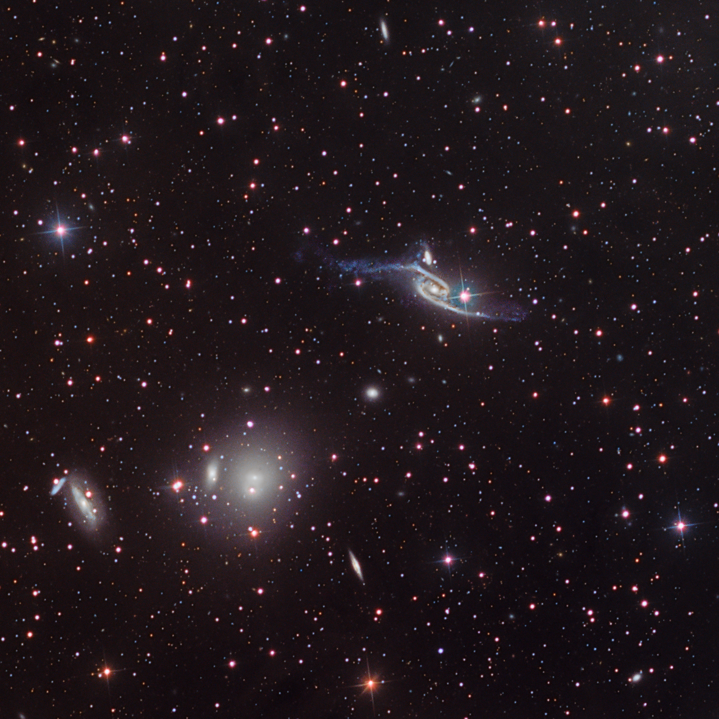 تصادم بين مجرة NGC6827 و مجرة IC 4970